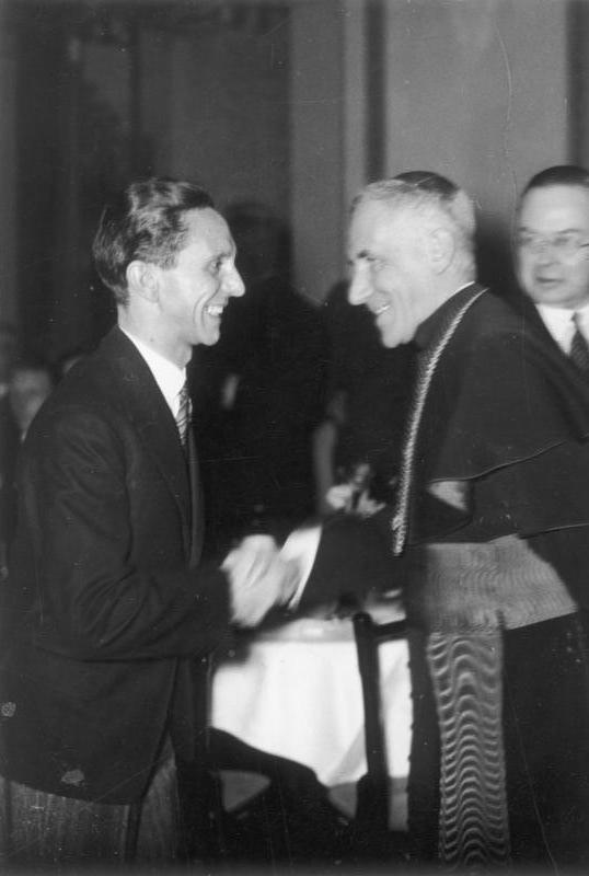 Der Nazipropaganda-Minister Goebbels begrüßt Nuntius Orsenigo im Propaganda-Ministerium.